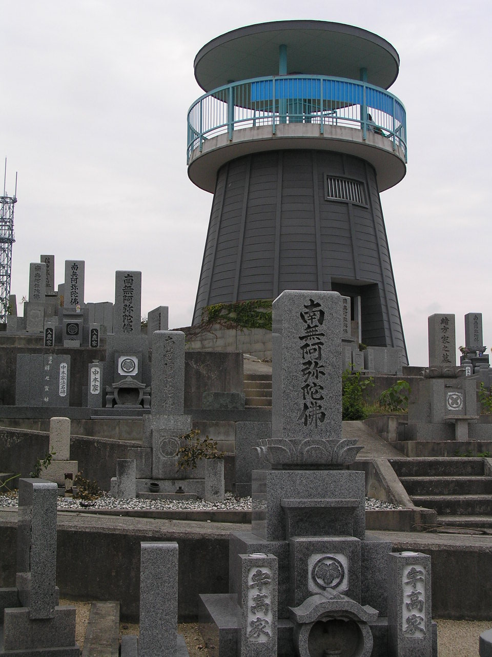 Kashira island in Bizen, Okayama,Japan 岡山県備前市日生町日生,頭島